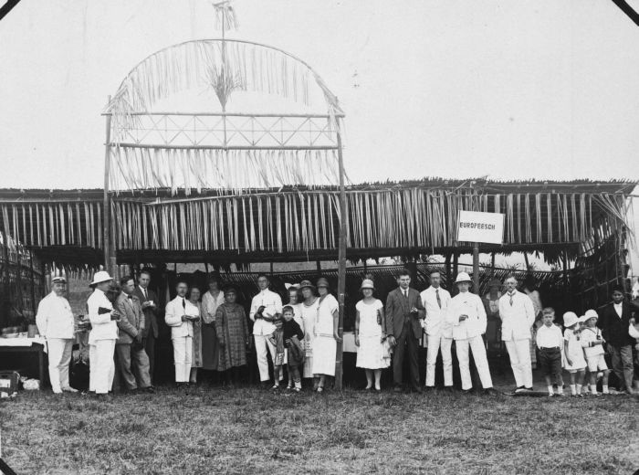 Foto. Europese genodigden op het feest ter gelegenheid van de benoeming van de Sibayak van Sarinembah